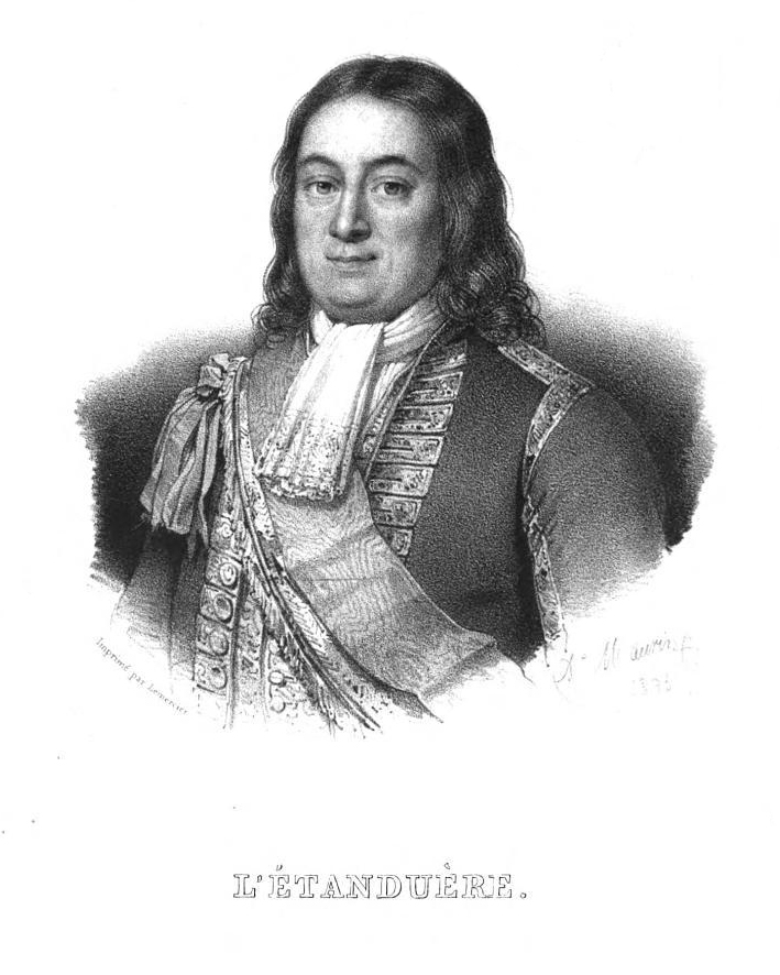 Portrait d'Henri-François des Herbiers, marquis de L'Estenduère (1682-1750), chef d'escadre de la Marine royale. Gravure du XIXème siècle